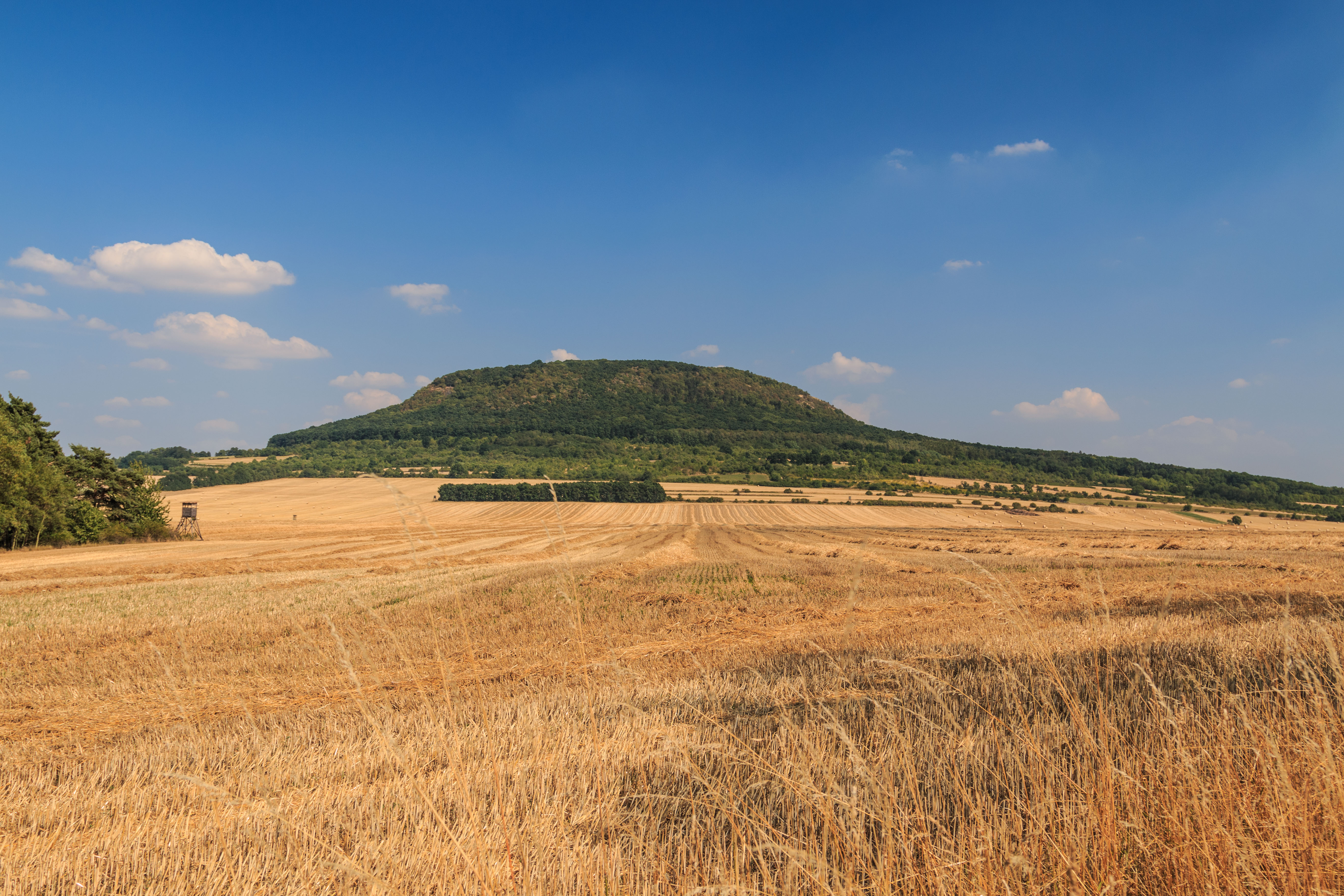 Národní přírodní památka Kleneč Project: Chráněná území